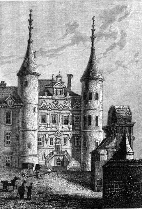 « Ancien Hôtel Mesgrigny » Image en provenance du livre : Eusèbe Girault de Saint-Fargeau, Guide pittoresque du voyageur en France, contenant la statistique et la description complète des quatre-vingt-six départements, orné de 740 vignettes et portraits gravés sur acier, de quatre-vingt-six cartes de départements et d'une grande carte routière de la France, par une Société de gens de lettres, de géographes et d'artistes, Paris, F. Didot frères, 1838, 6 volumes in-8° (BNF : 8-L25- 46). Volume III Route de Paris à Nice traversant les départements de l'Isère, des Hautes-Alpes, des Basses-Alpes et du Var. auteurs dessins : Rauch (ou autre) auteurs gravures : Skelton fils, Schroeder, Bishop (ou autre)